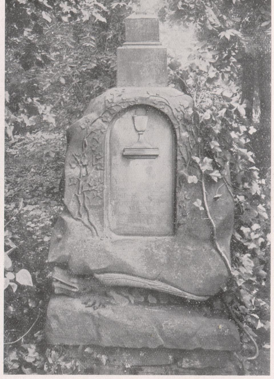 Grabstein Domkapitular Bruno Würschmitt 1938